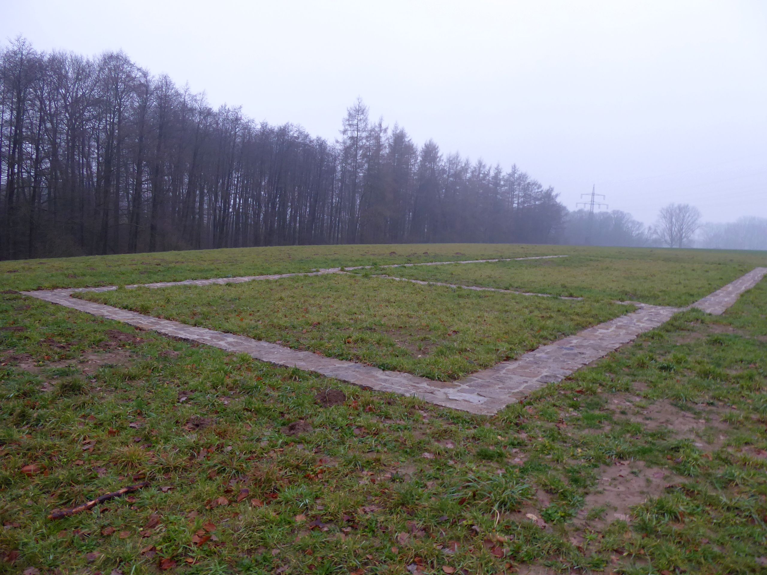 Kloster Müdehorst, Bielefeld, Grundmauern der Kirche